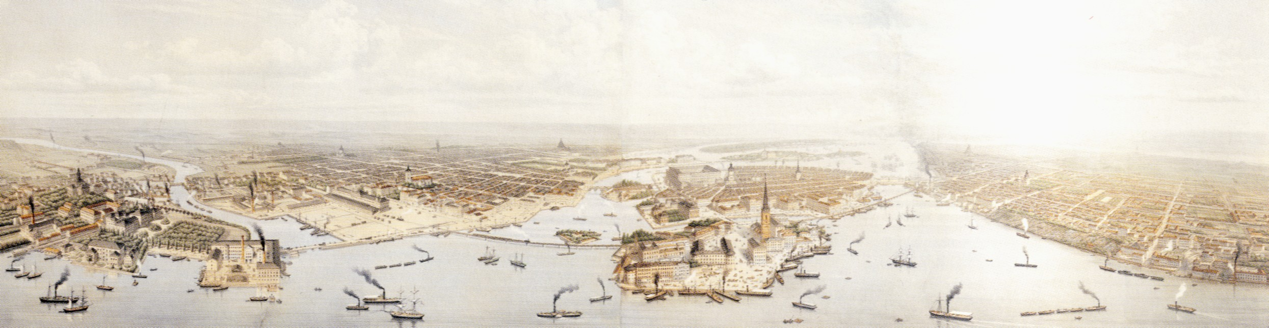 Panorama över Stockholm